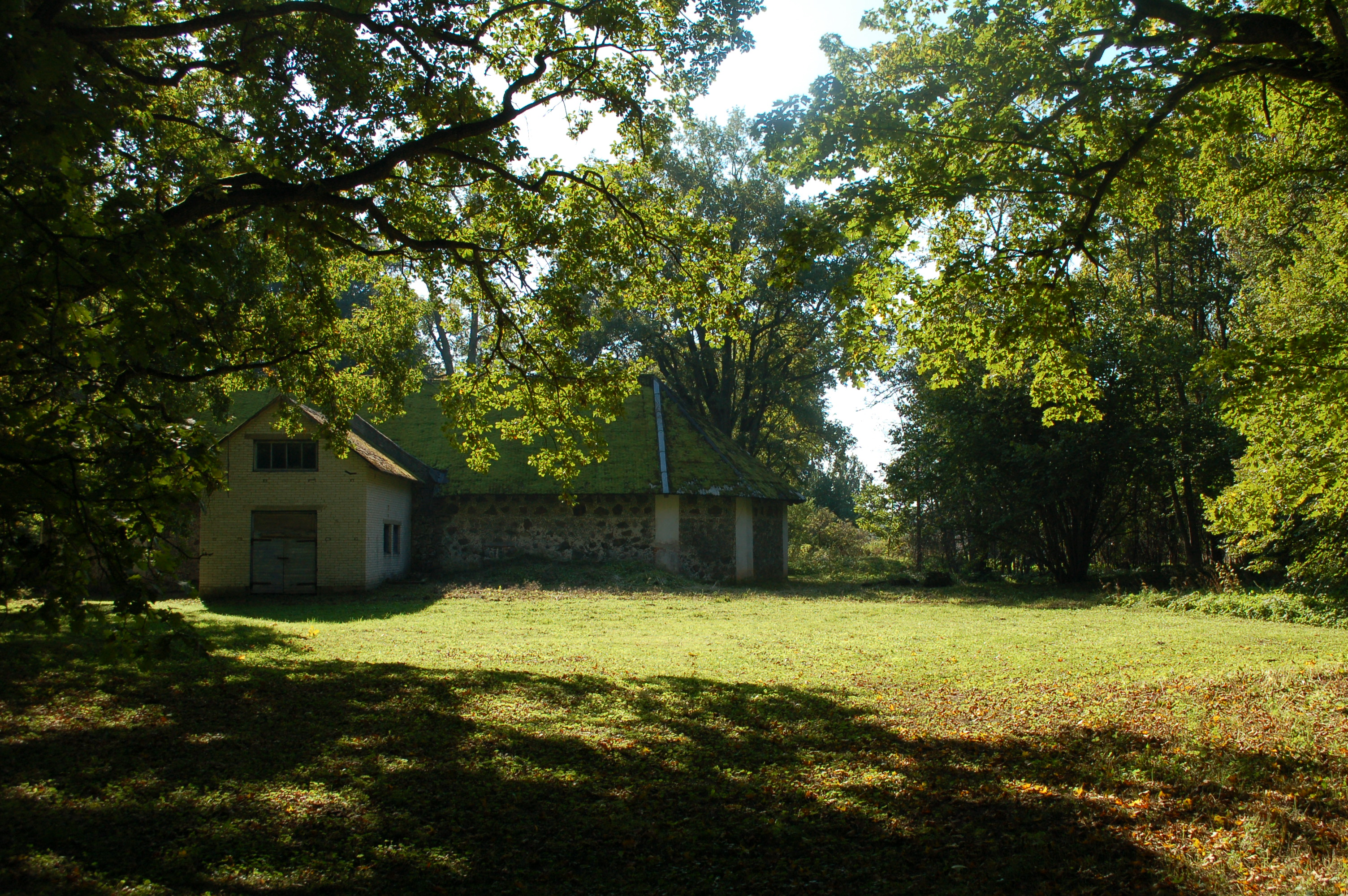 Autor: Mart Raudsaar